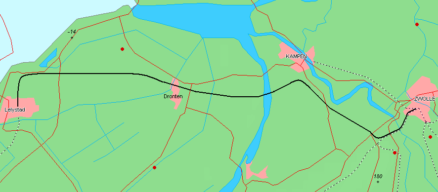 Kaartje met de route van de Hanzelijn, gebaseerd op kaart van (vrije software gebaseerd op vrije database)